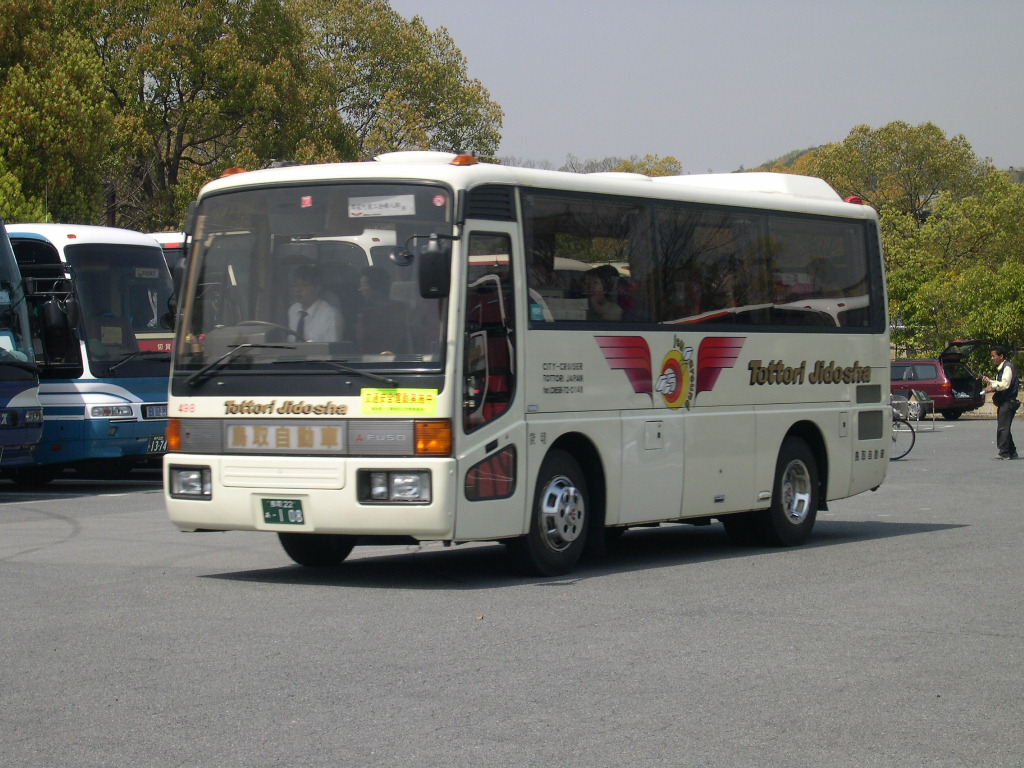 姫路城貸切バス駐車場にて 2004-4-10撮影